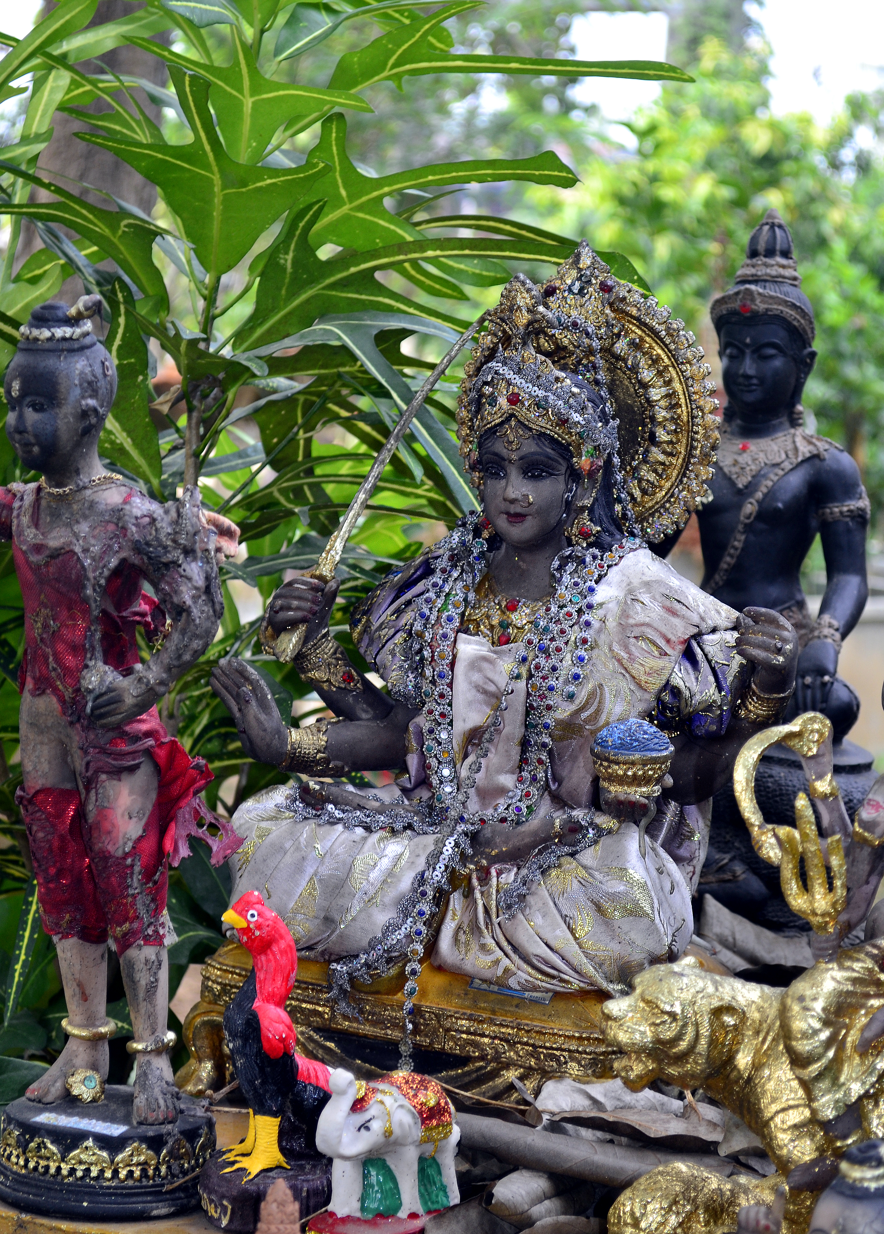 Geisterhausbereich am Wat Rat Satthatham im Tambon Pak Khwae, Amphoe Mueang Sukhothai